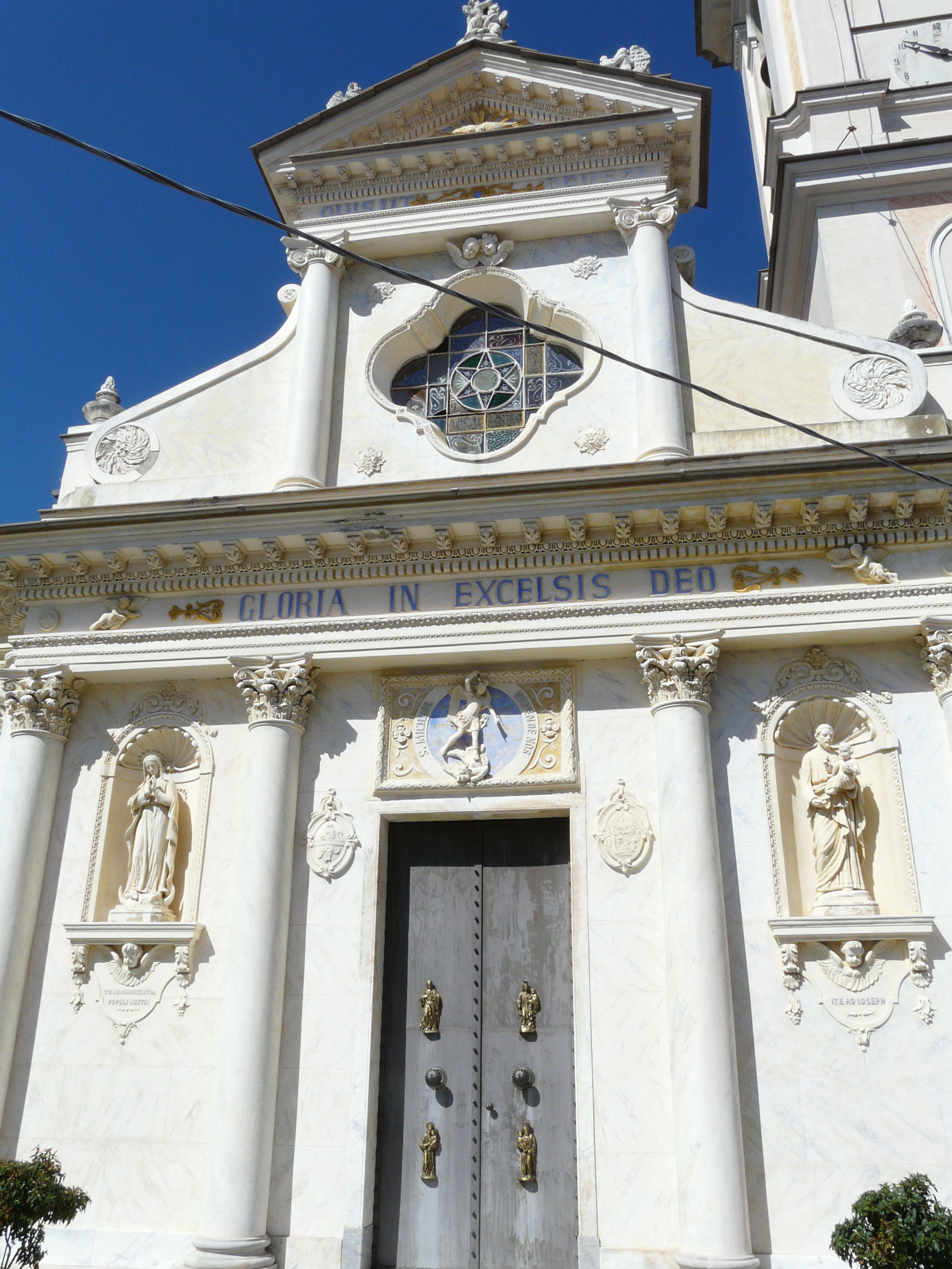 Chiesa di San Michele, Romaggi, San Colombano Certenoli, Liguria, Italia